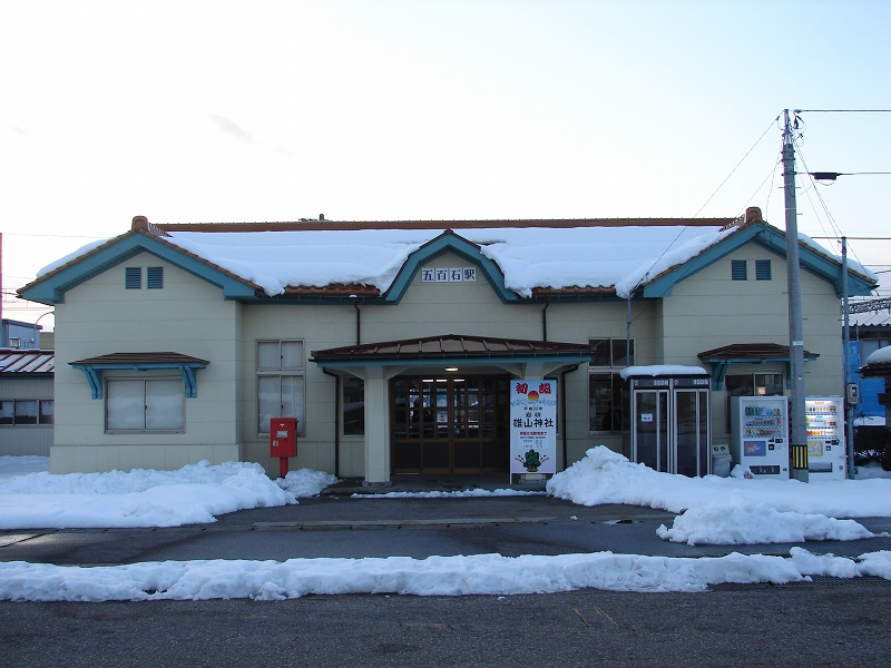 五百石駅の駅舎の写真です。 2008年1月2日 撮影者：Series207